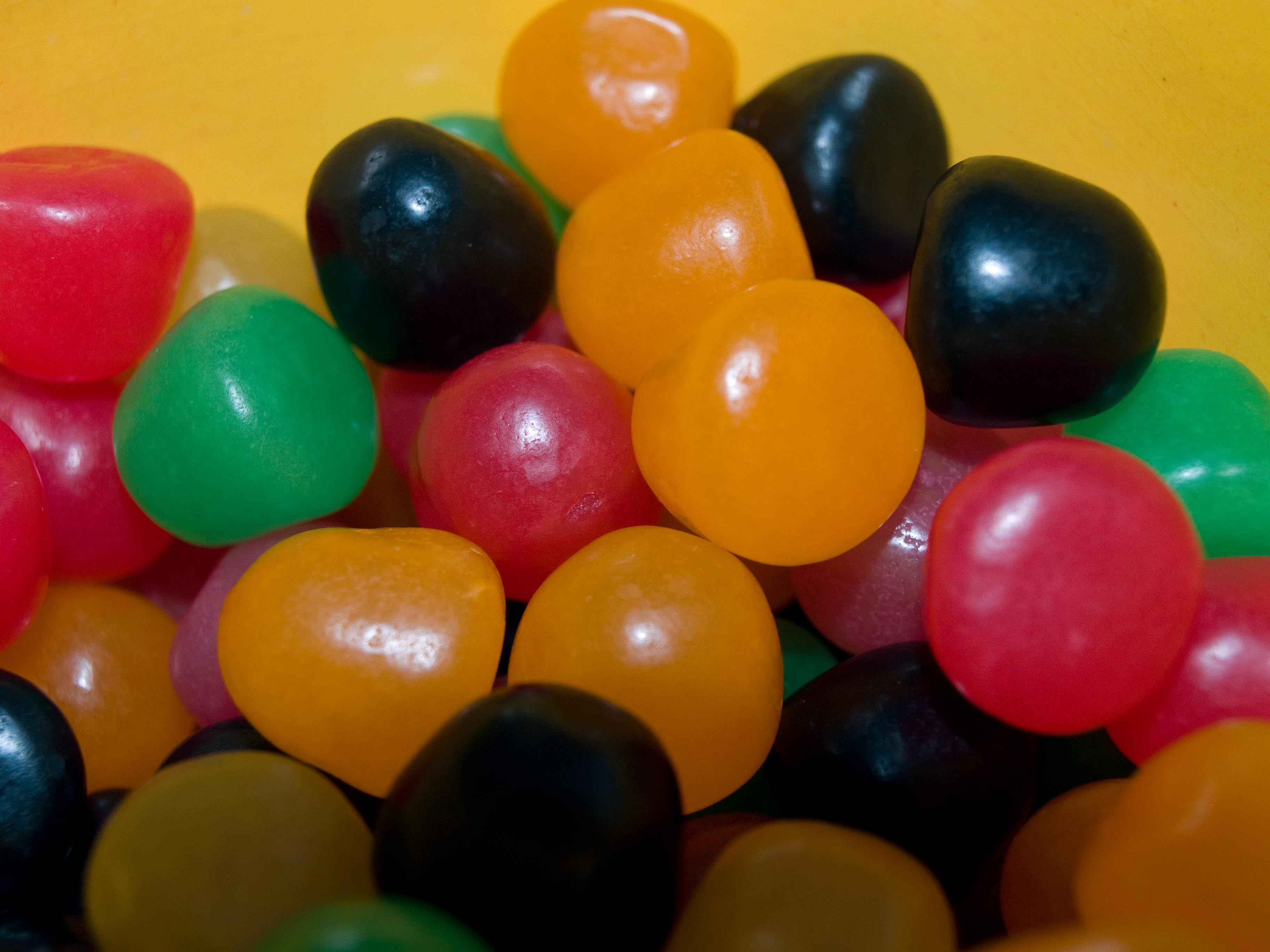 Dragibus, bonbons sans gélatine de la marque Haribo.